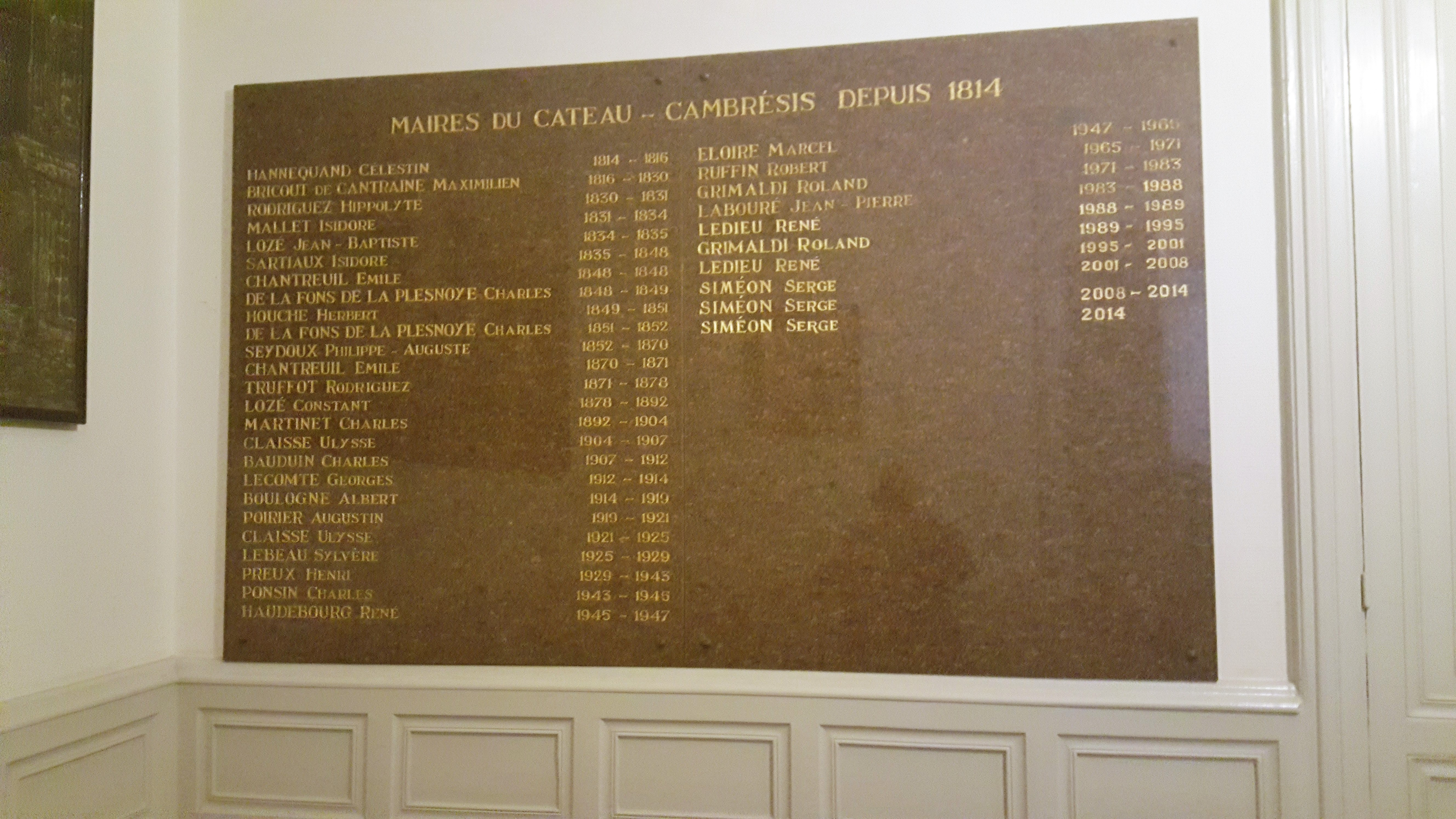 Plaque de Marbre listant les maires de la ville du Cateau Cambrésis depuis 1814. Cette plaque est visible dans le hall d'entrée de l’hôtel de ville